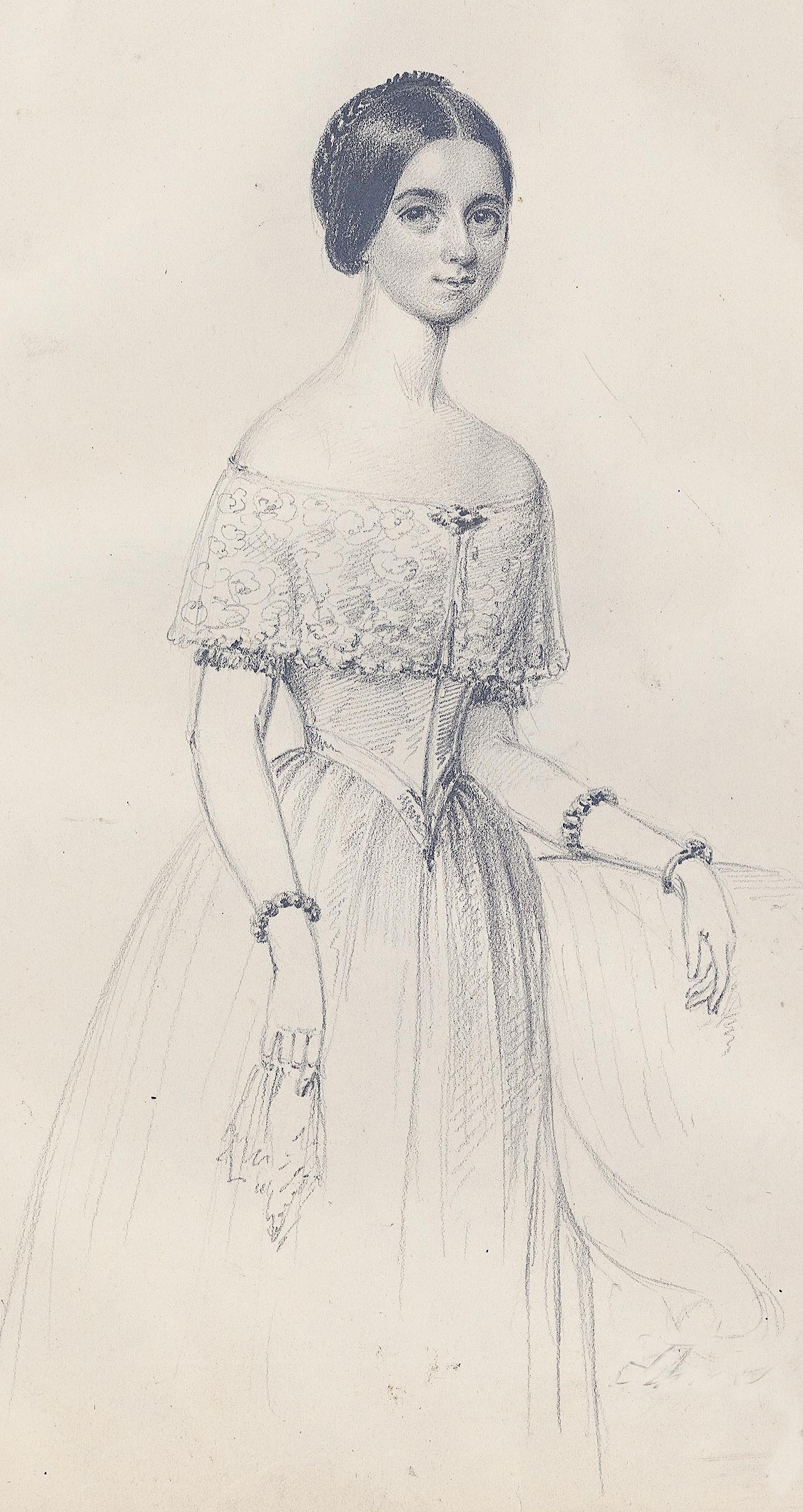 Aurora Strandberg (1826-1850)